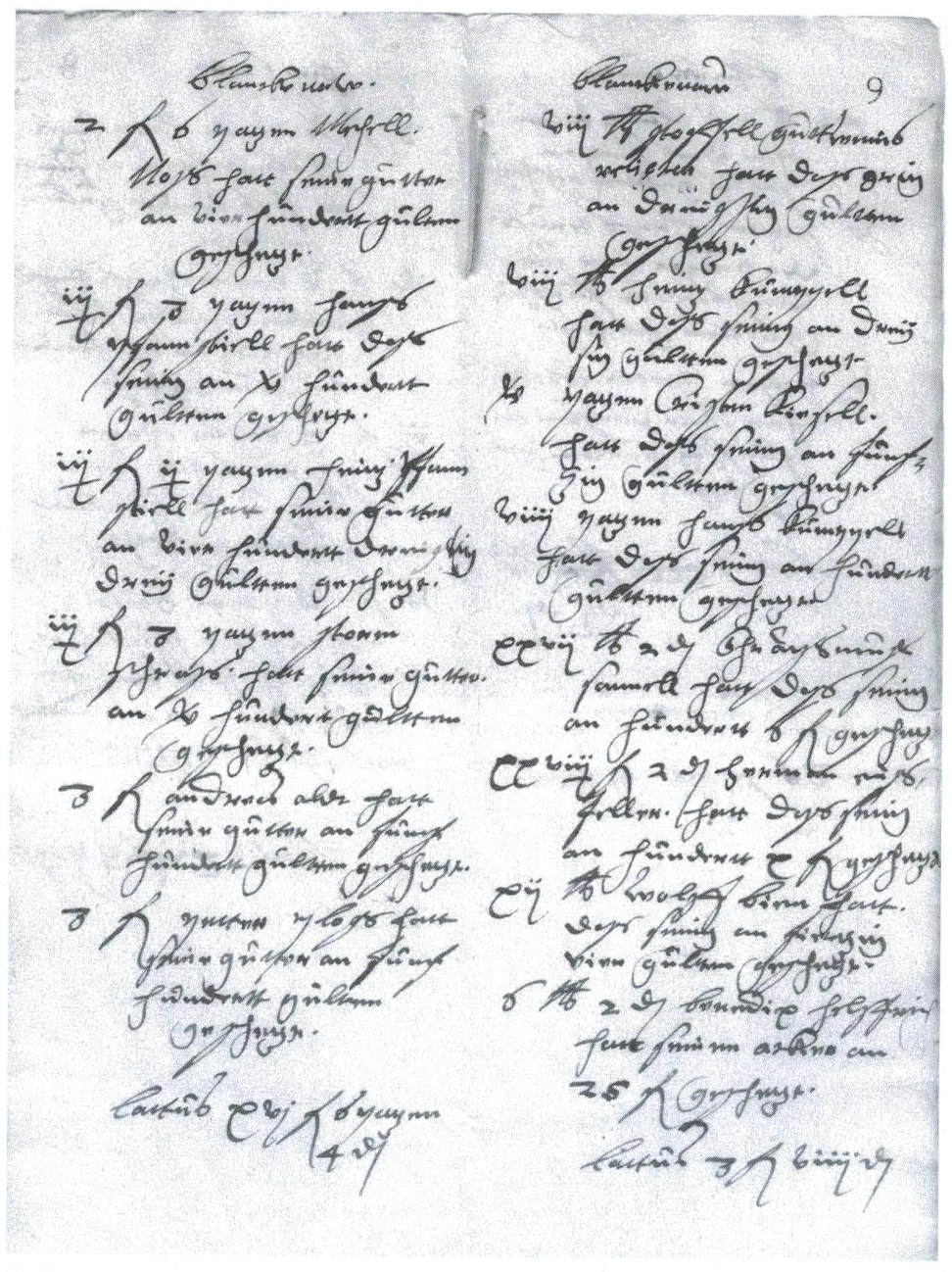 Rechnung vom Amt Blankenau aus dem Türkersteuerregister von 1605